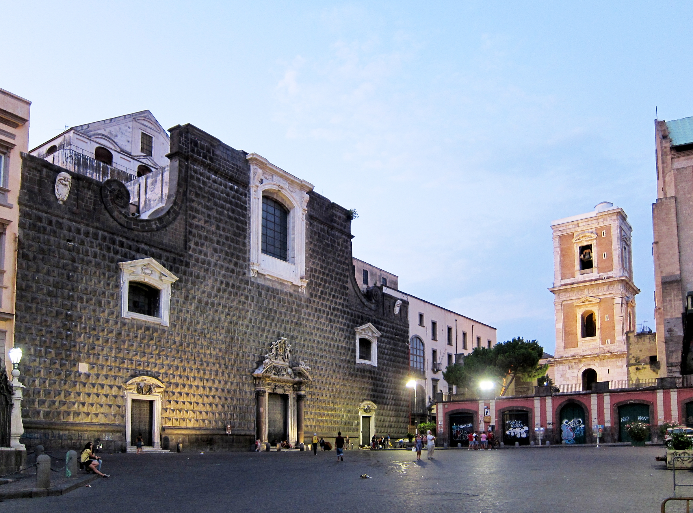 La Piazza del Gesù Nuovo à Naples.